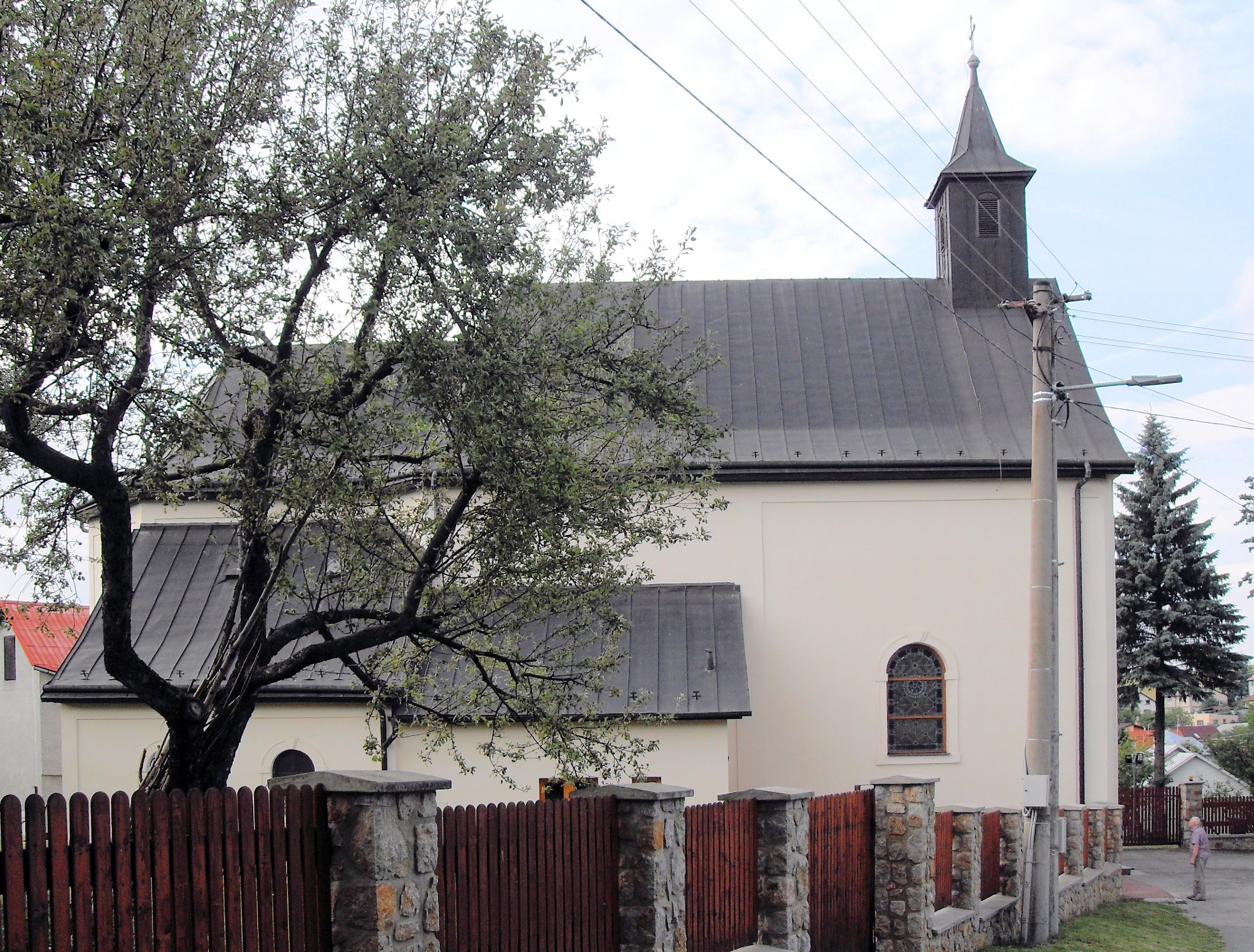 Košice-Kavečany, Rímskokatolícky kostol Sv. Petra_a_Pavla